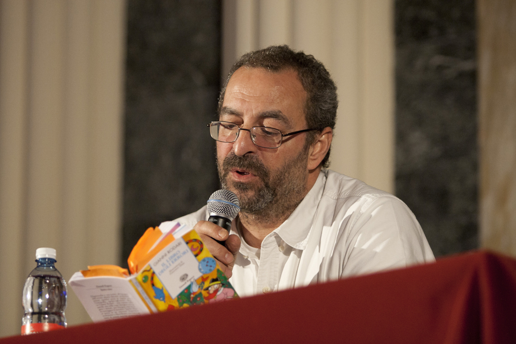 Giancarlo Bozzo